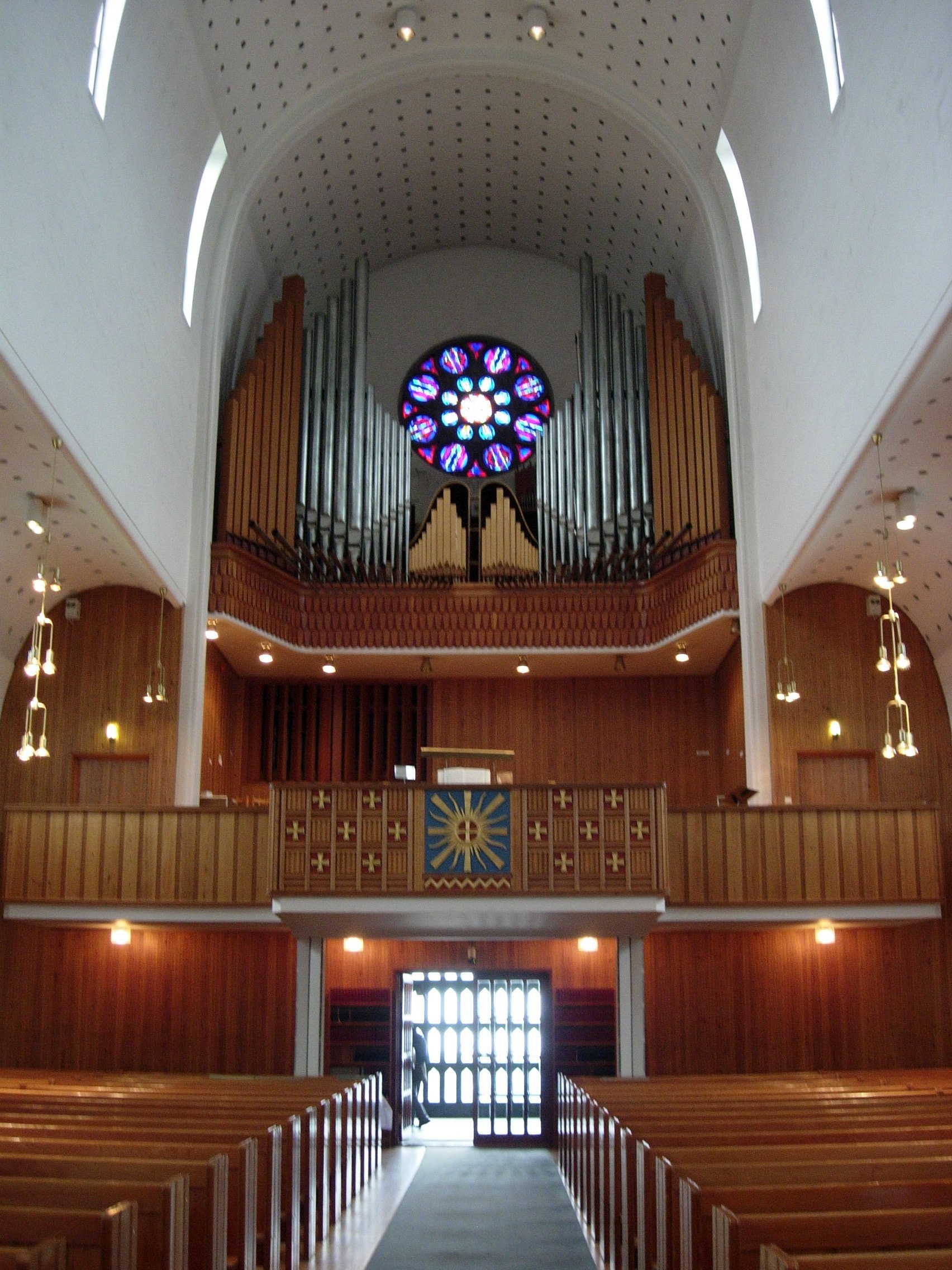 Utgangsparti i Bodø domkirke